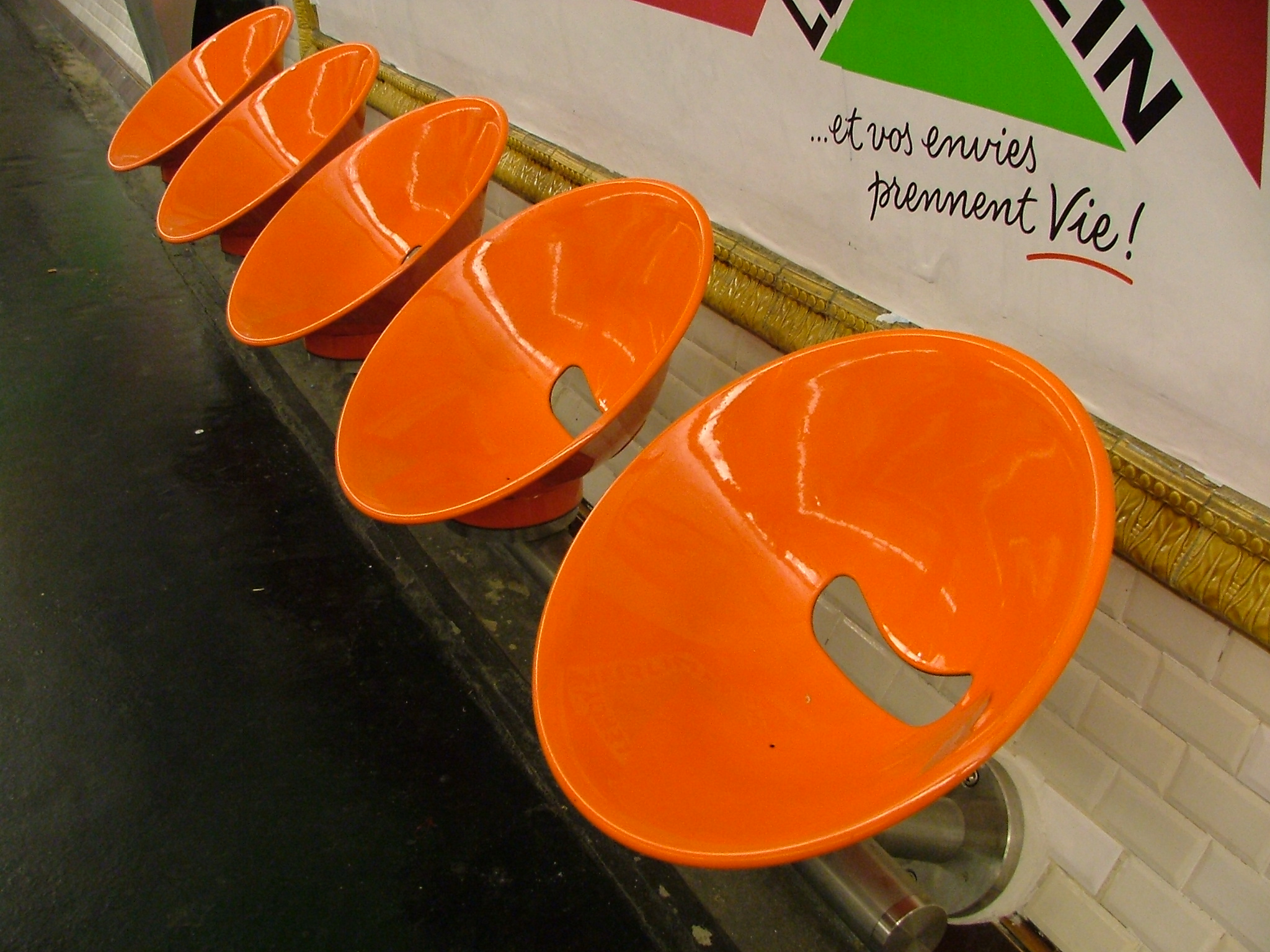 Sièges Akiko (design Atelier à Kiko, fabricant Concept Urbain).